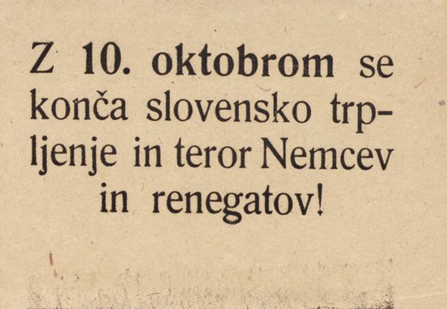 Nalepka ob plebiscitu Z 10. oktobrom se konča slovensko trpljenje in teror Nemcev in renegatov!